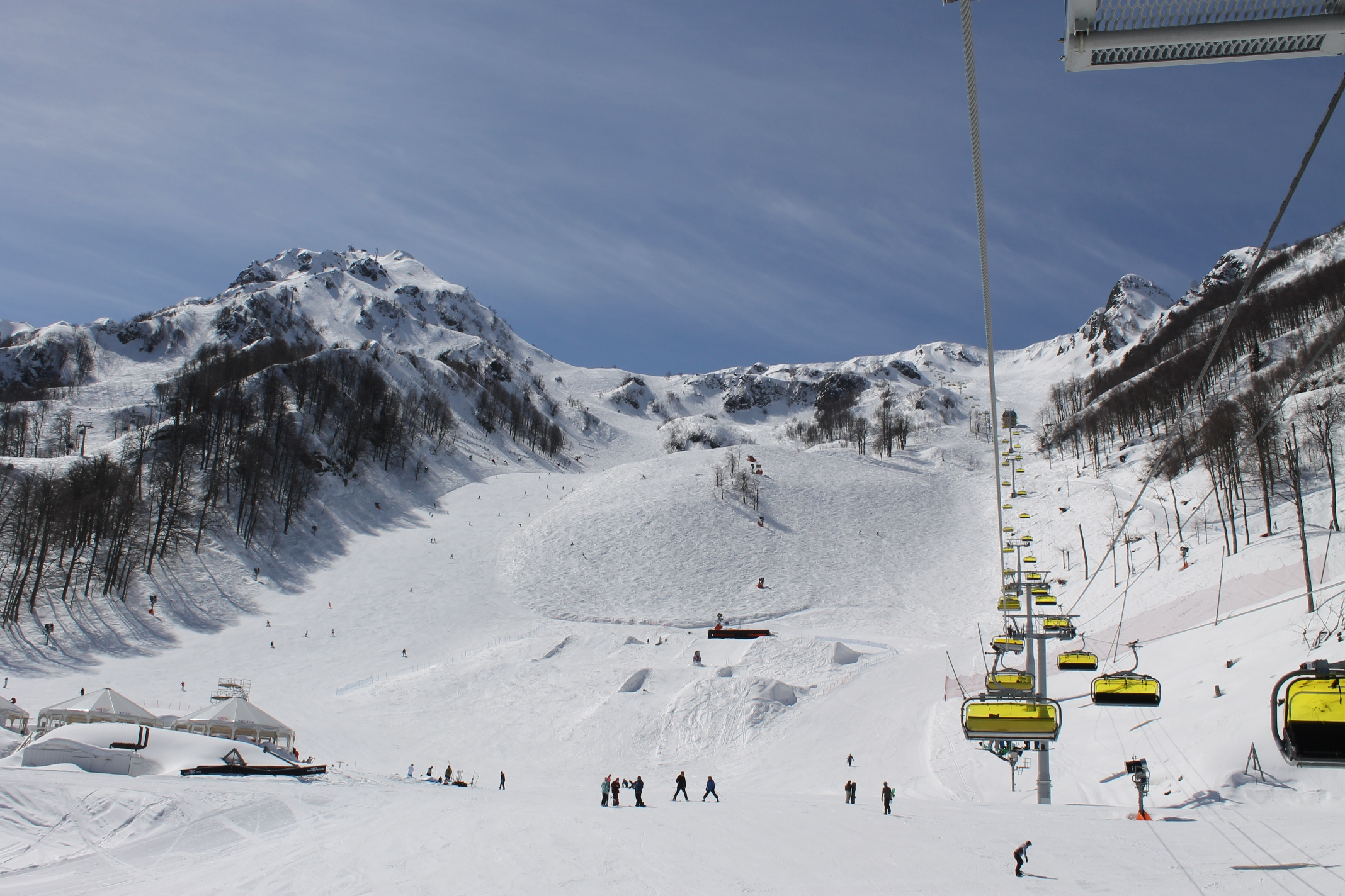 Трассы горнолыжного комплекса Роза Хутор на отметке 1600 м. н.у.м.